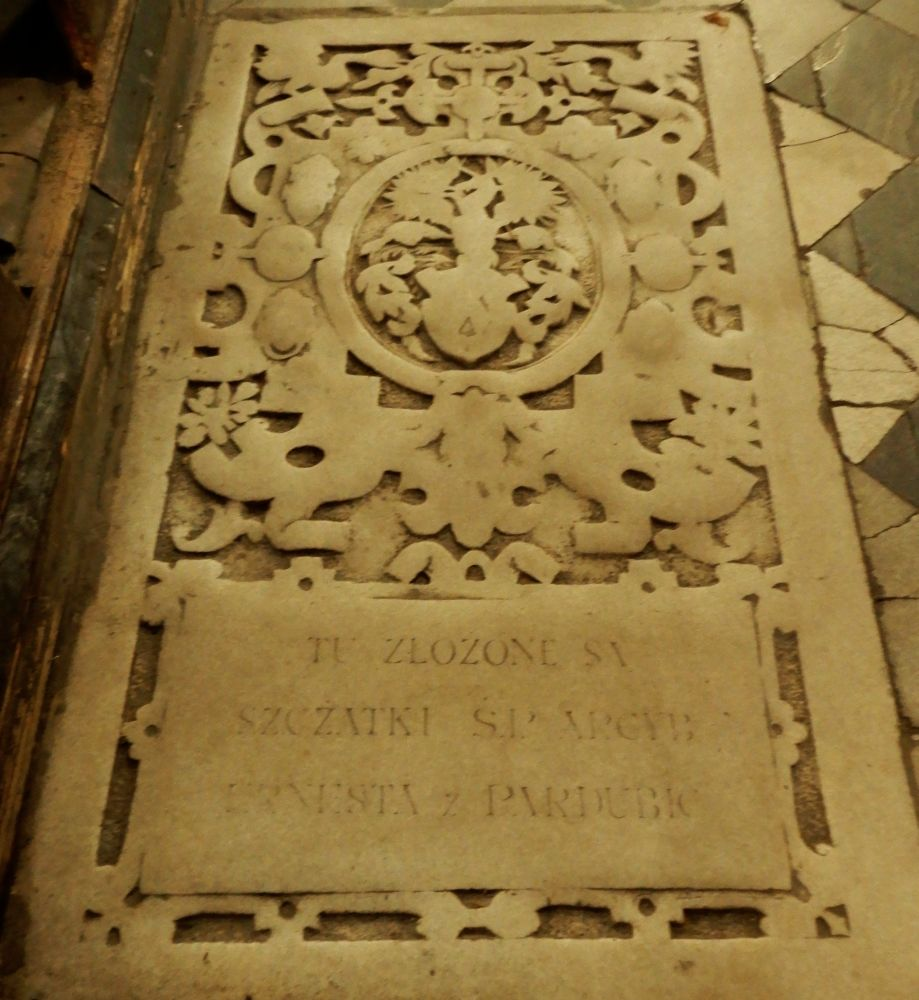 Kladsko - kostel nanebevzetí Panny Marie, náhrobní deska Arnošta z Pardubic ze 16. století